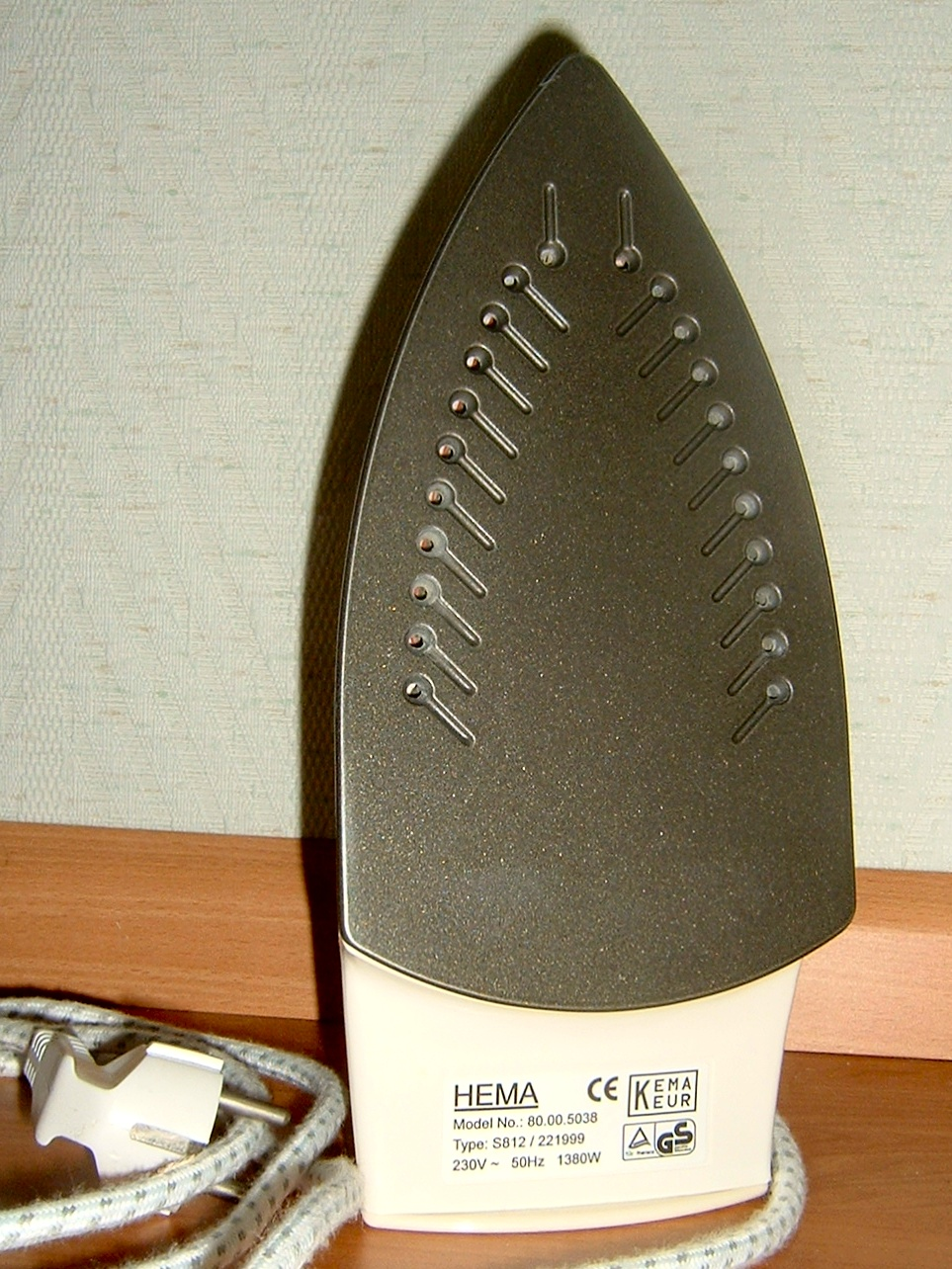 Foto van de zool van een stoomstrijkijzer